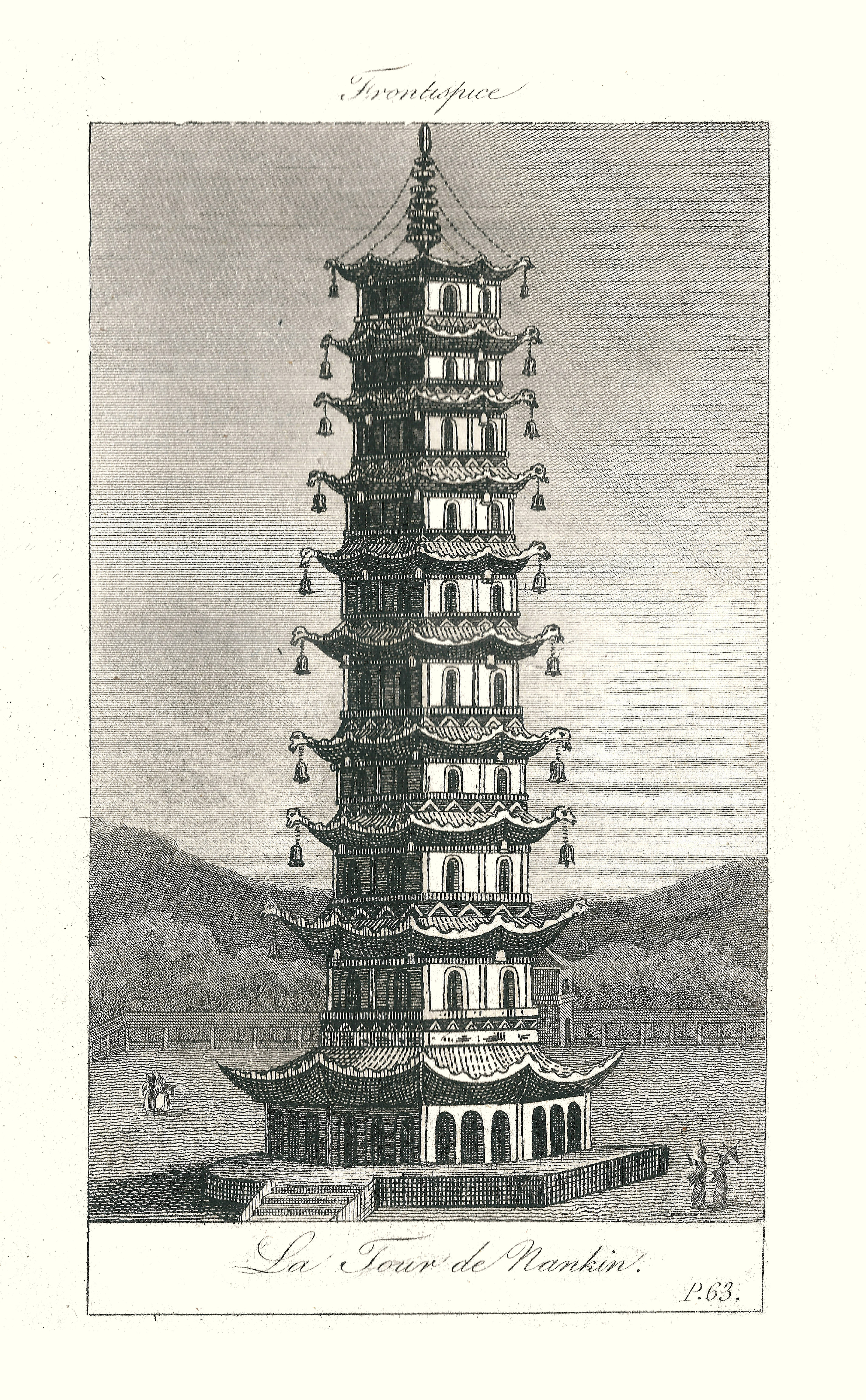 Pagode de porcelaine de Nankin